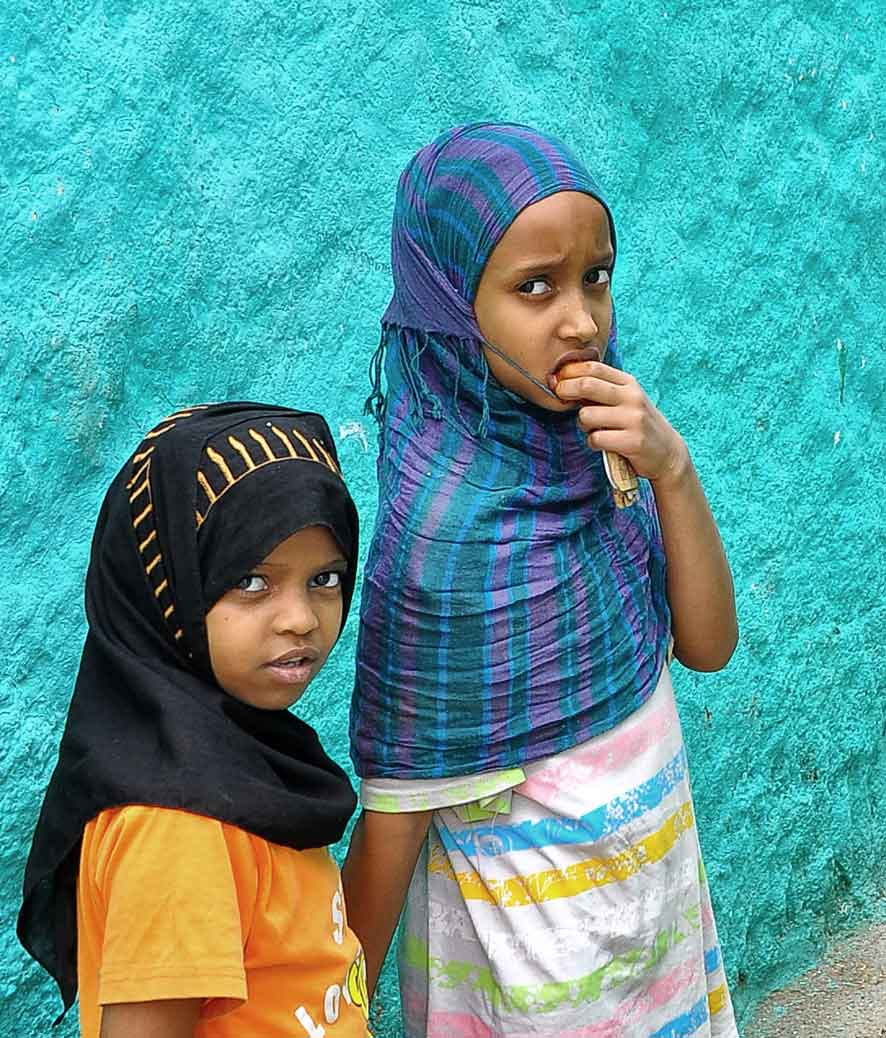 Harar